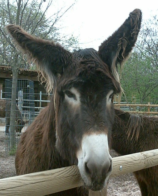 Poitouesel